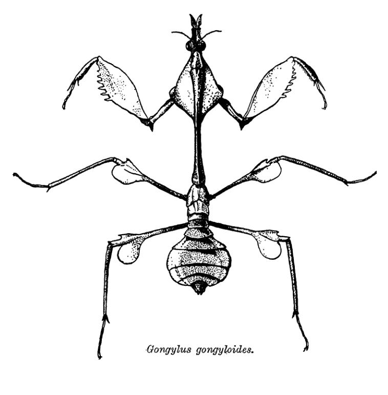 Gongylus gongyloides, Empusidae, Mantodea